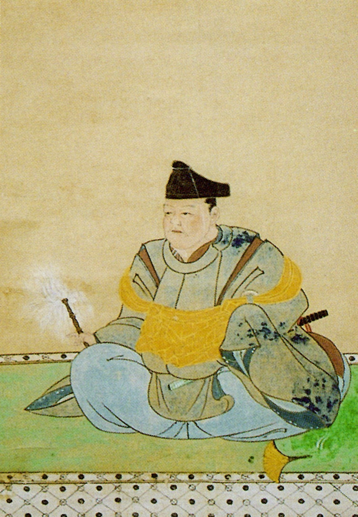 龍造寺長信の肖像。